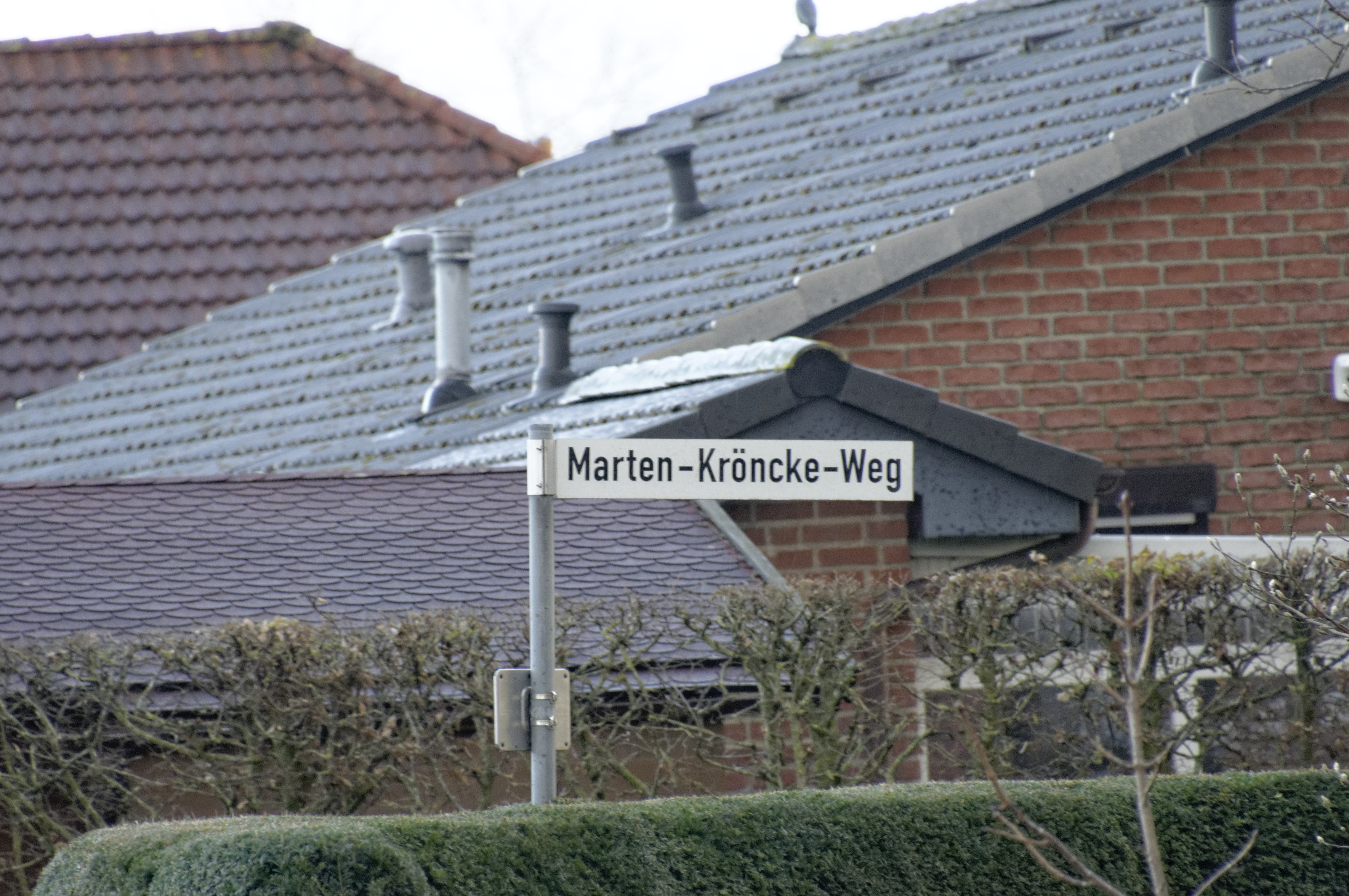 Neuenkirchen (Land Hadeln) 2017 Marten-Kröncke-Weg